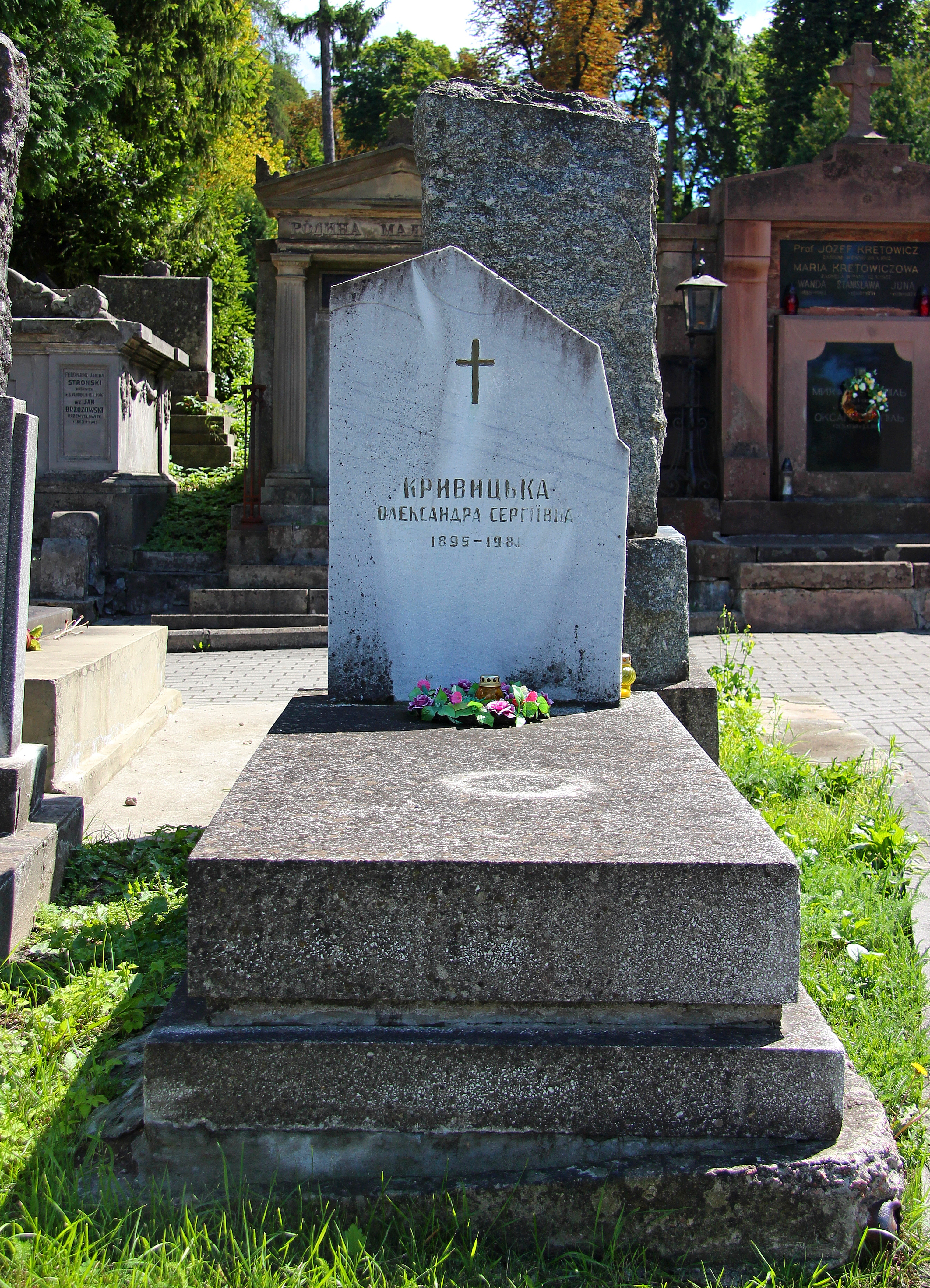 Могила Олександри Кривицької. Личаківський цвинтар ,поле № 3 а.